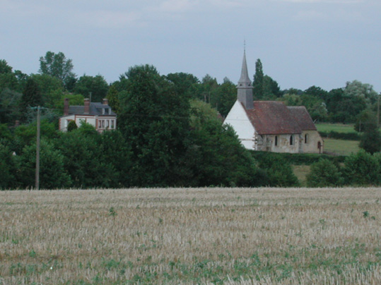 A Saint-Pierre-de-Sommaire dans l'Orne, le Prieuré, ancienne demeure du sculpteur Antoine Loignon, et la chapelle qu'il avoisine.